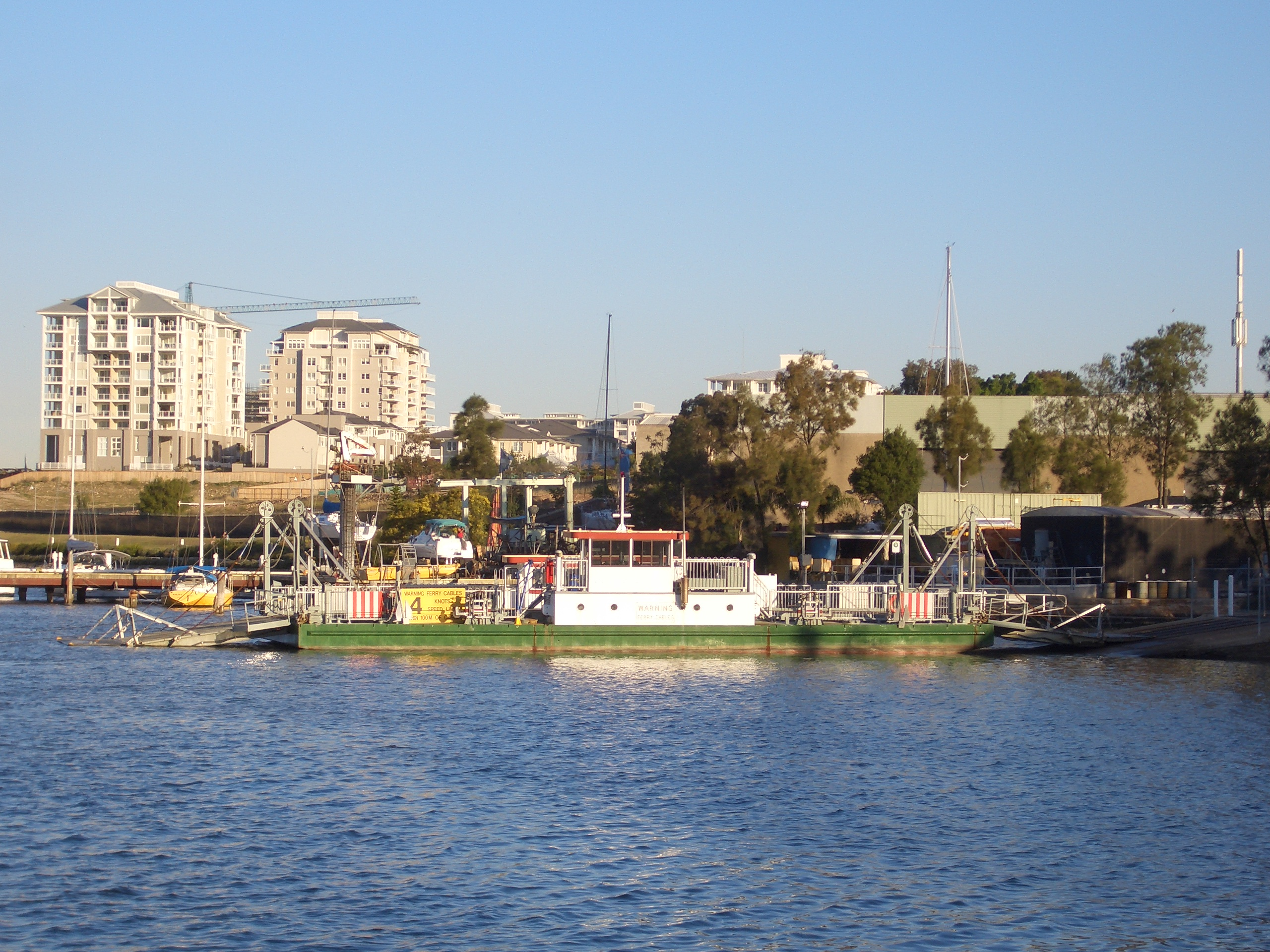 Mortlake Punt, Sydney